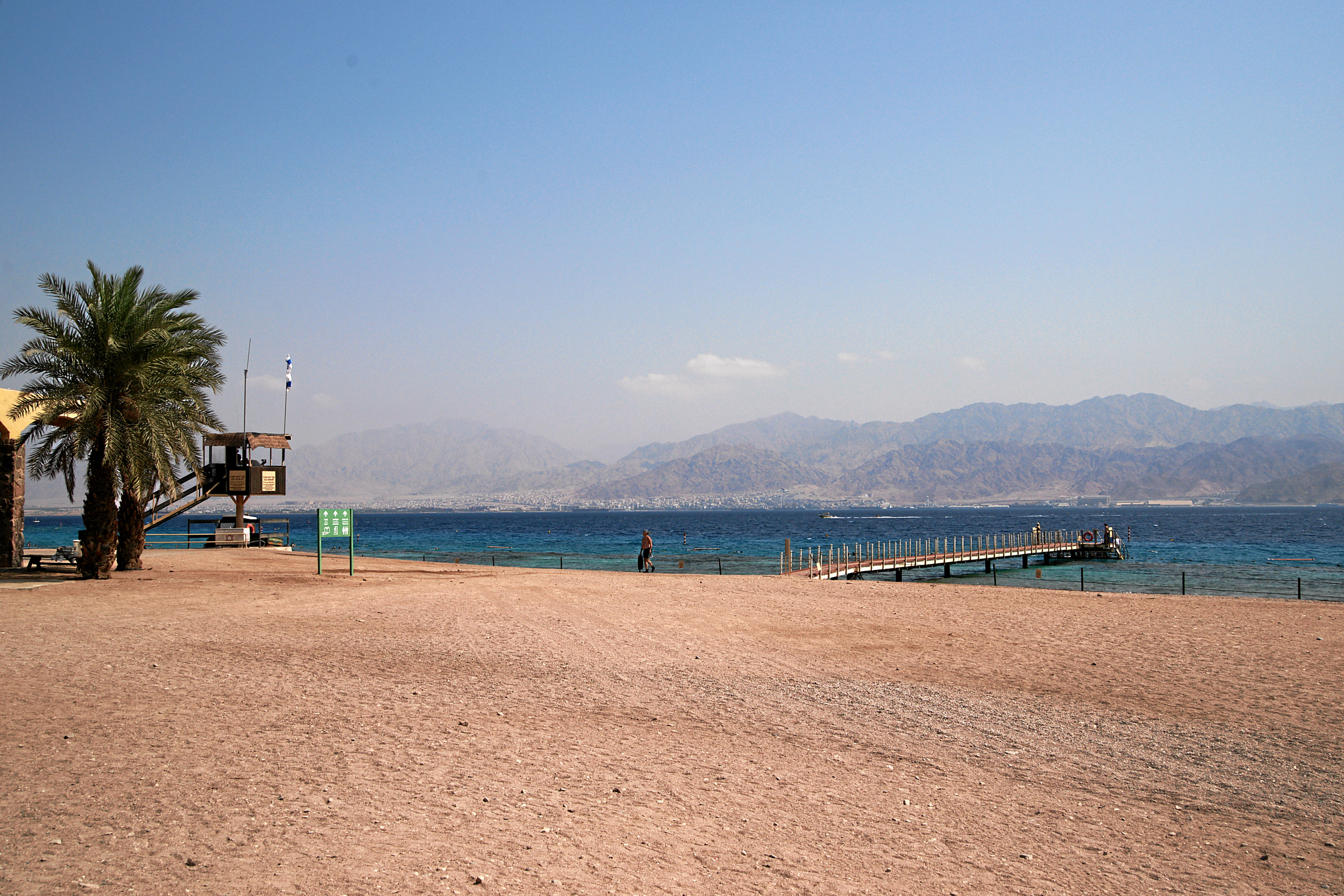 Coral Reef Reserve INPA